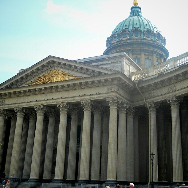 Июль 2014